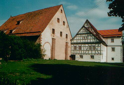 Pfarrkirche St. Aurelius in Hirsau, Blick von Südost auf Spuren abgerissener Bauteile